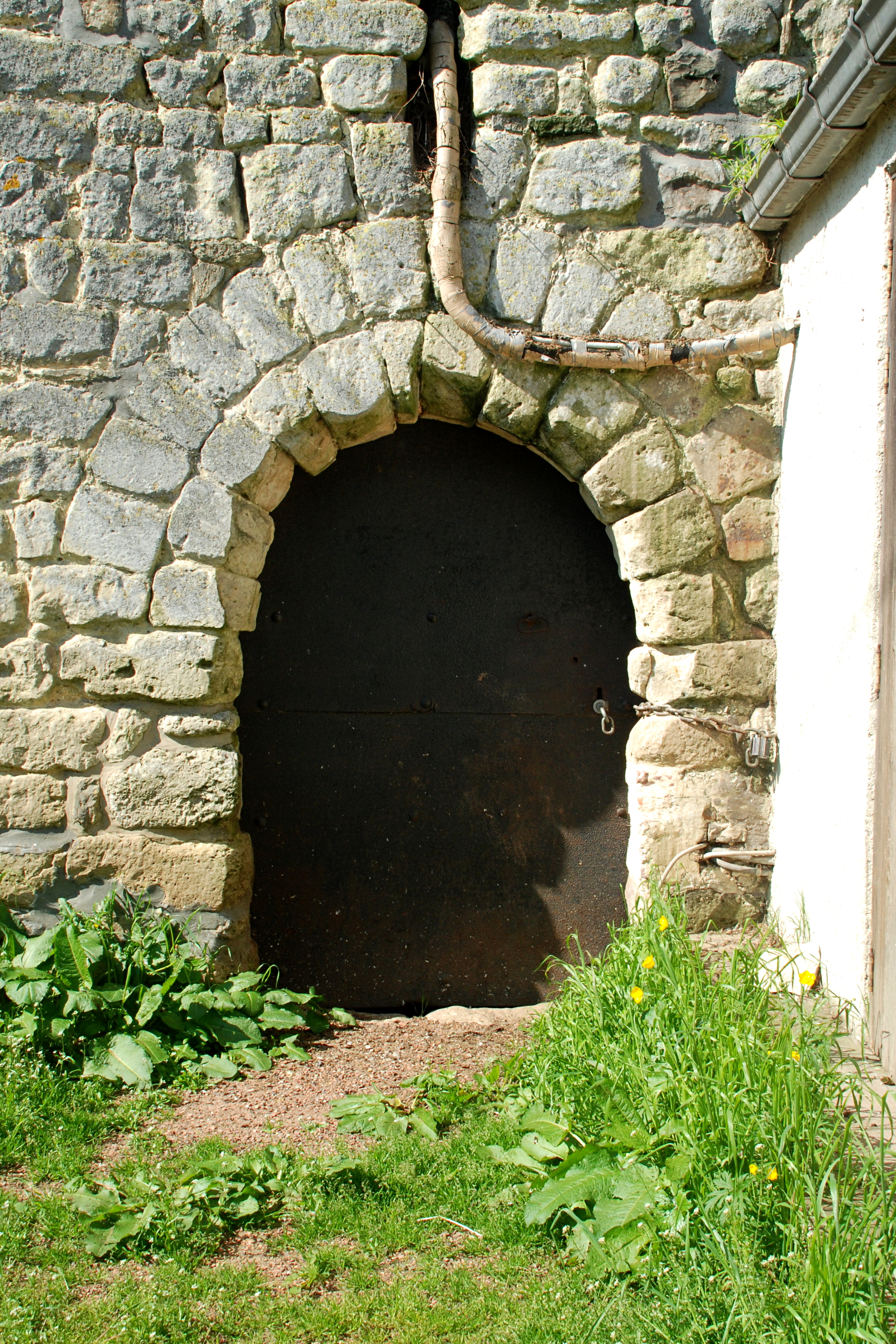 Belgique - Brabant wallon - Mont-Saint-Guibert - Corbais - Tour Griffon du Bois (donjon de Corbais, 13e siècle)